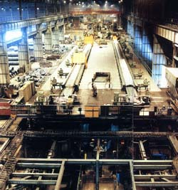 tren de alambre